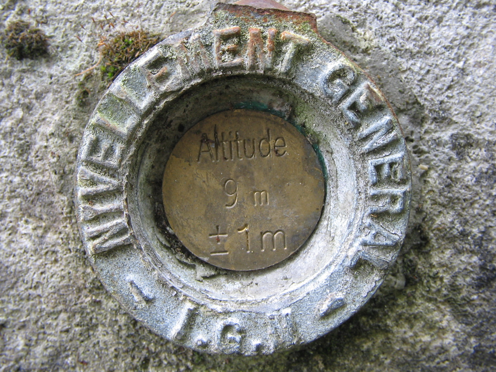 Le niveau d'altitude de Taugon (17)